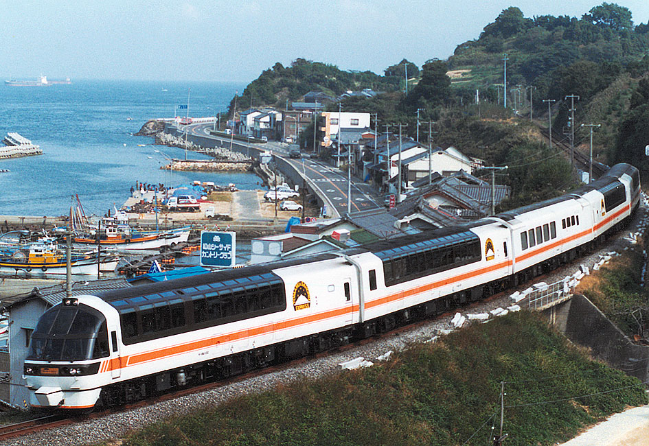 予讃線菊間駅 - 浅海駅間を走る JR北海道 キハ84トマムサホロエクスプレス